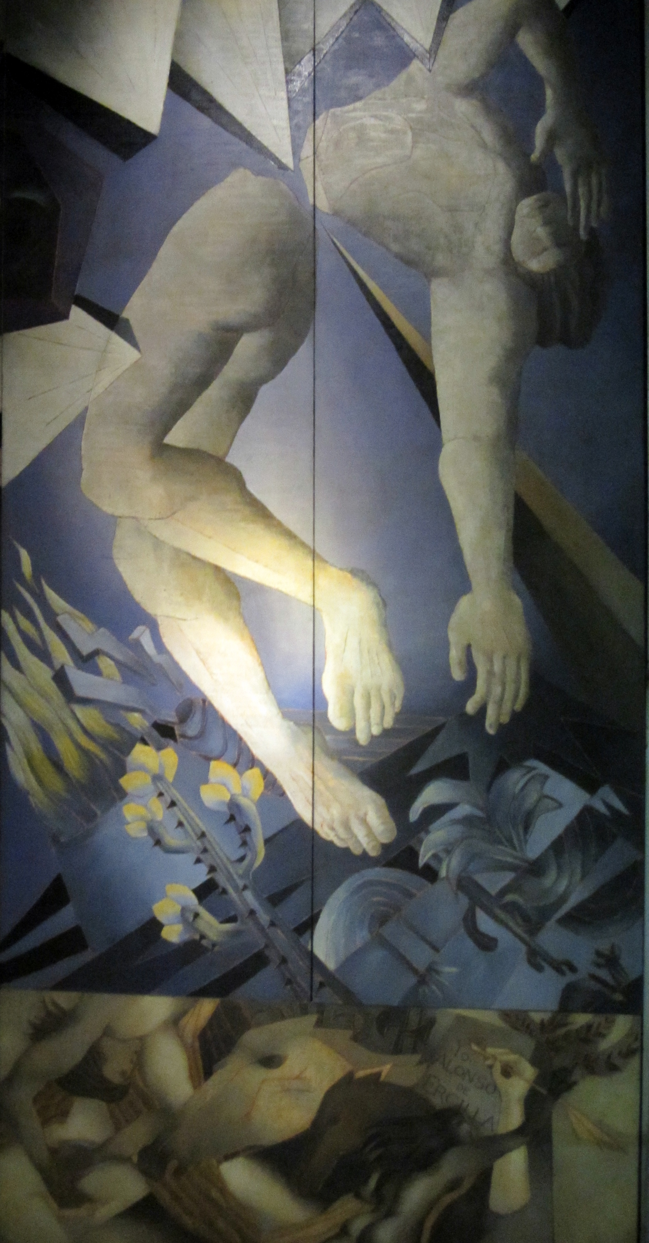 Caupolicán en el suplicio de la pica, una de las escenas que integran La conquista, mural del pintor chileno Mario Toral que forma parte de la gran obra titulada Memoria visual de una nación, metro Universidad de Chile, en Santiago de Chile. El panel está en el suroriente de la estación.